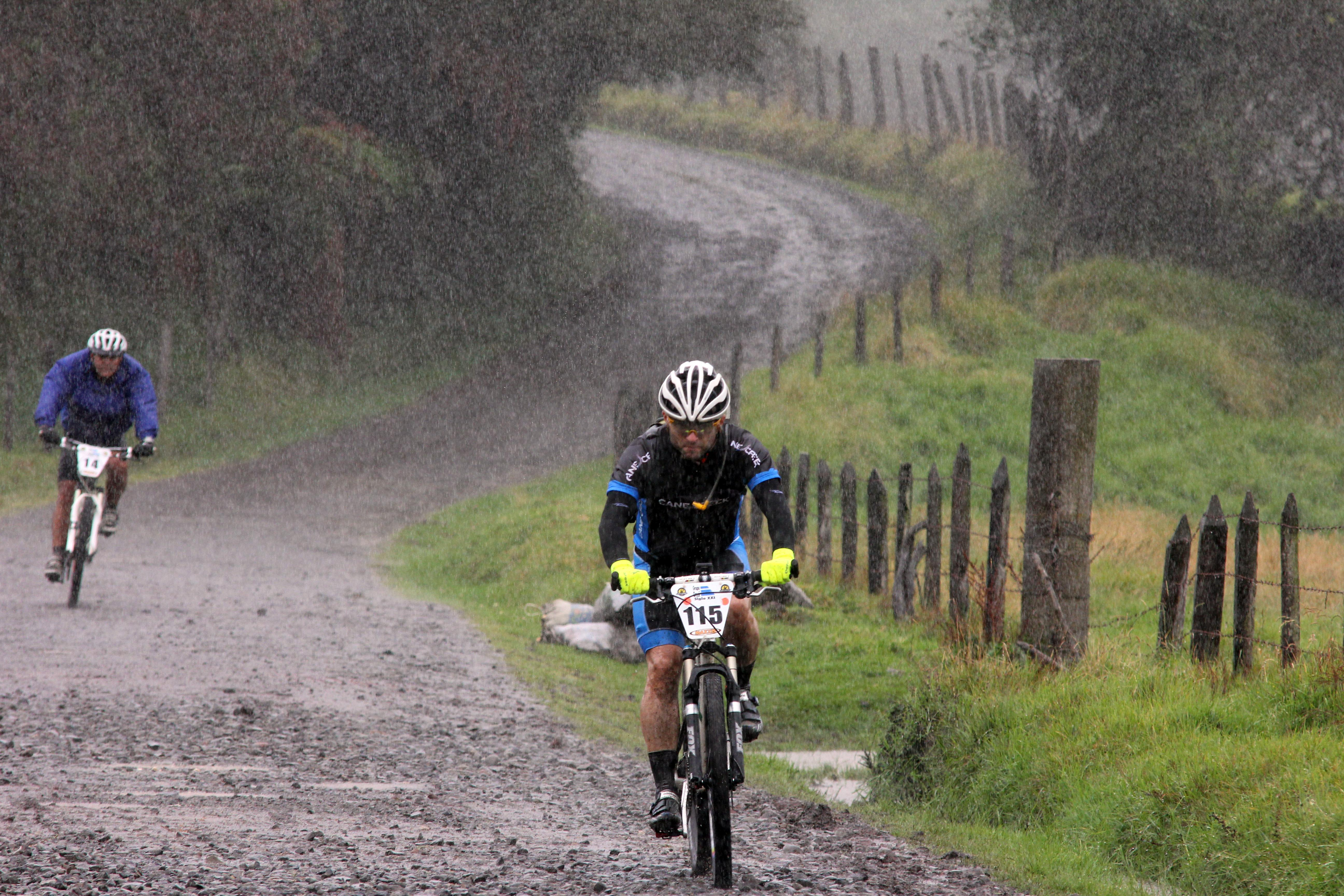 Descenso del Volcán Irazú al Volcán Turrialba. En una de las etapas de La Ruta De Los Conquistadores. Competencia de ciclismo de montaña múlti etapa. Cataloga como las dura del planeta.